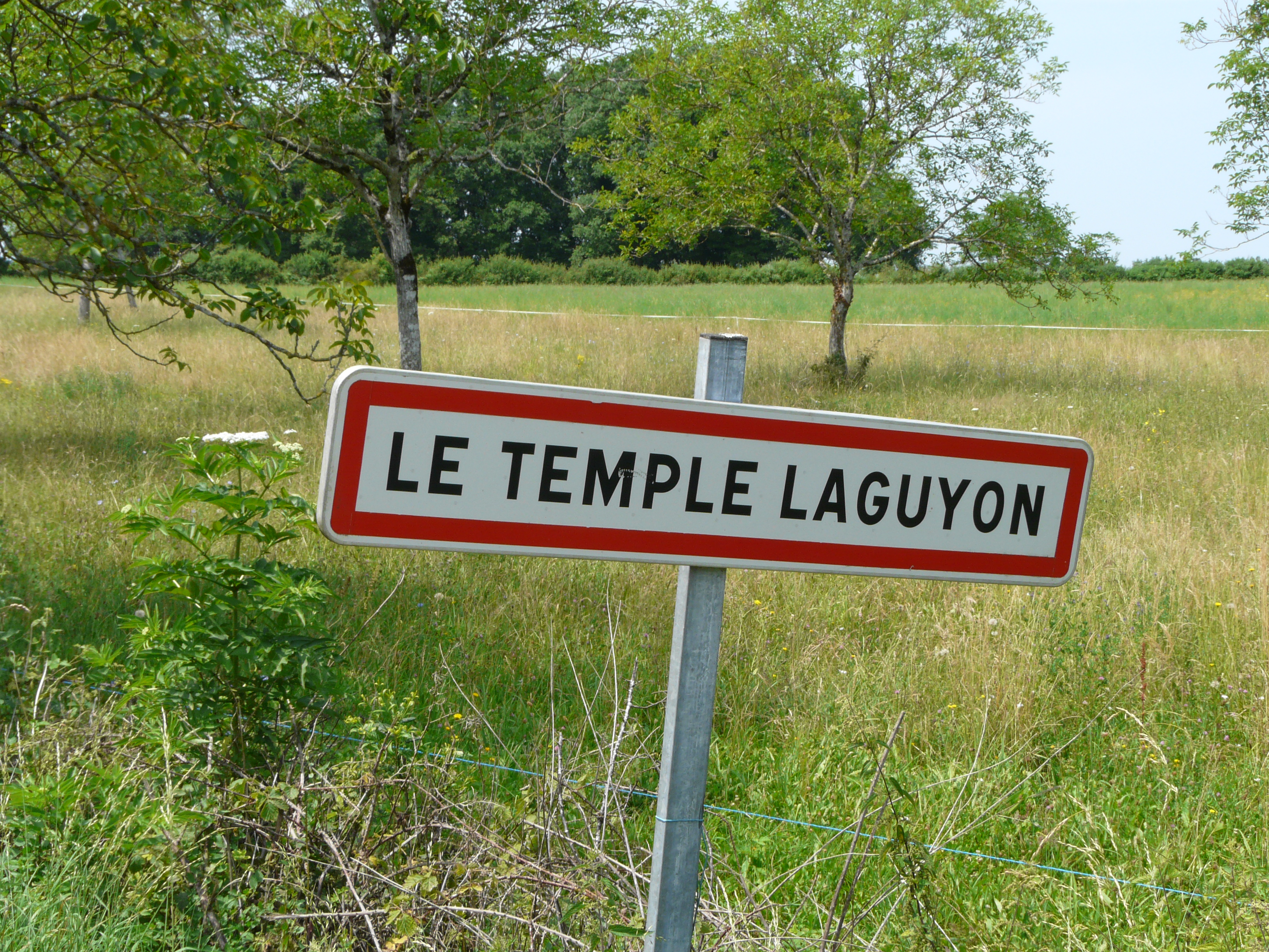 Panneau d'entrée dan le bourg de Temple-Laguyon, Dordogne, France.